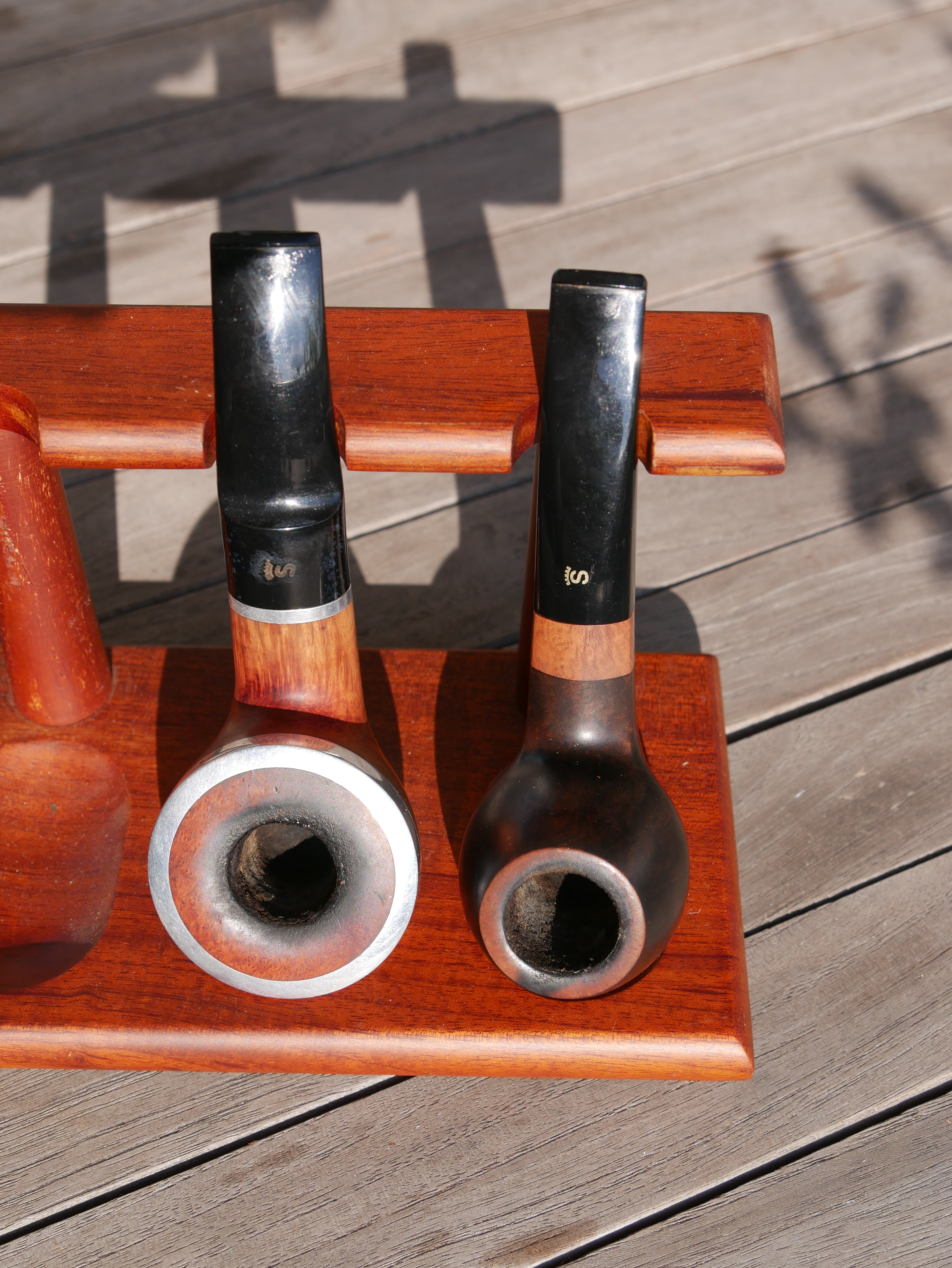 2 Pfeifen der Marke Stanwell auf einem Pfeifenständer aus Holz